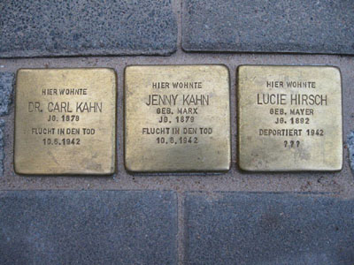 Stolpersteine Oeserstr 54 für Commons.wikimedia freigegeben von der Initiative Stolpersteine Frankfurt am Main